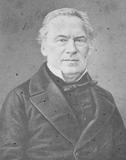 Fotografisches Porträt von Joseph Eutych Kopp (1793-1866